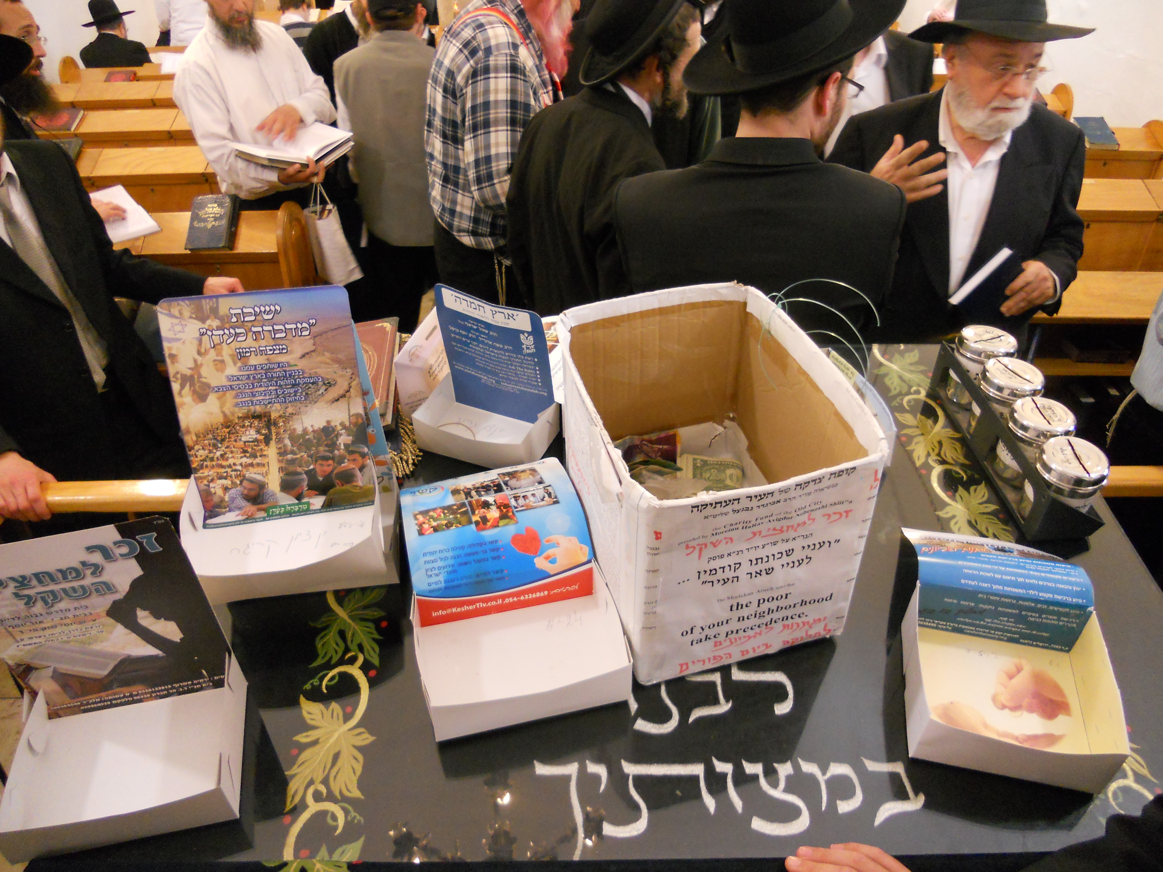 בבית כנסת הרמב"ן